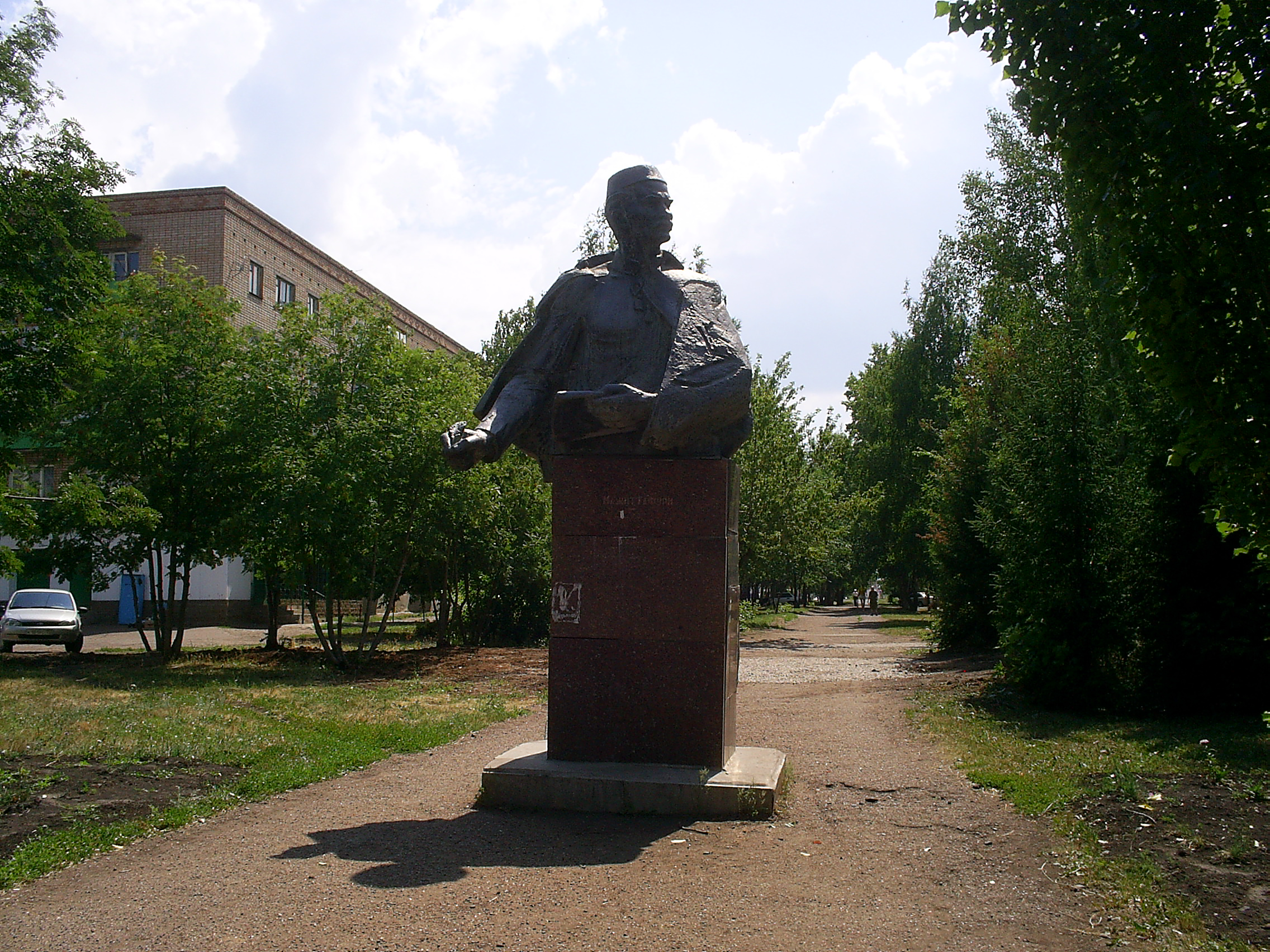 Памятник Мажиту Гафури 16.07.2009